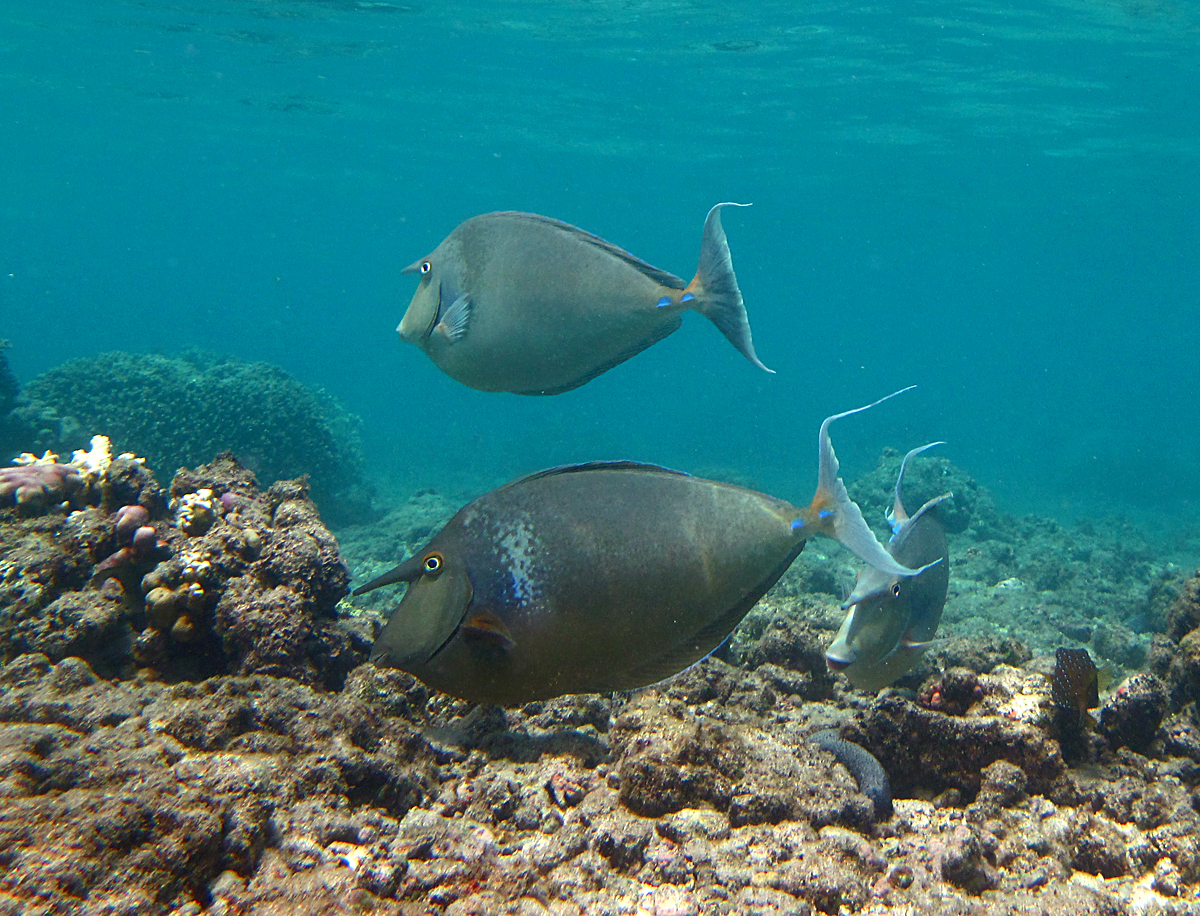 Un nason à éperons bleus (Naso unicornis) à la Réunion.